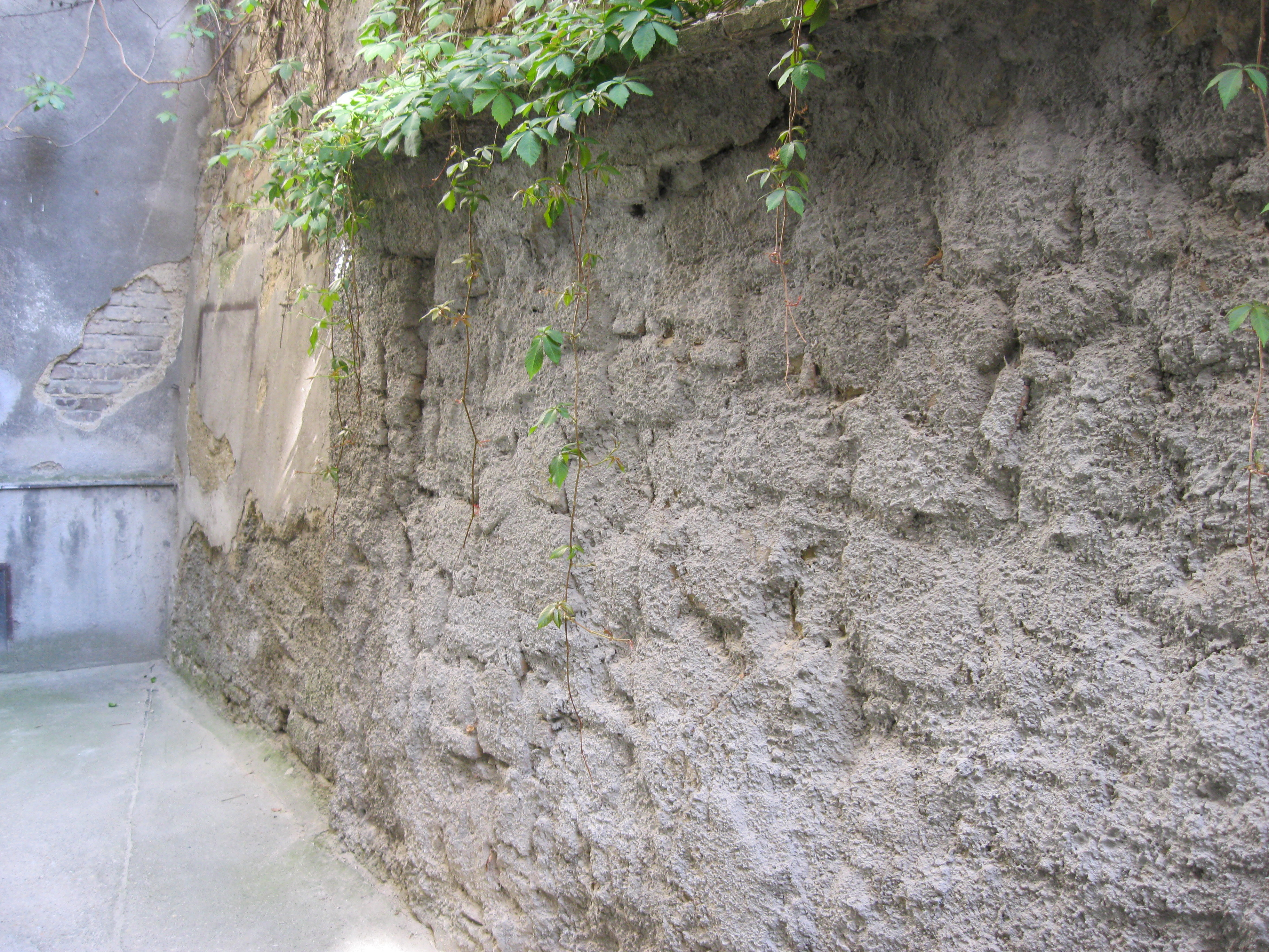 Letzte Reste der Ghettomauer (Aufnahme in der Tandelmarktgasse 8), welche das ehemalige Karmeliterkloster vom jüdischen Ghetto trennte. Denkmalgeschützt.